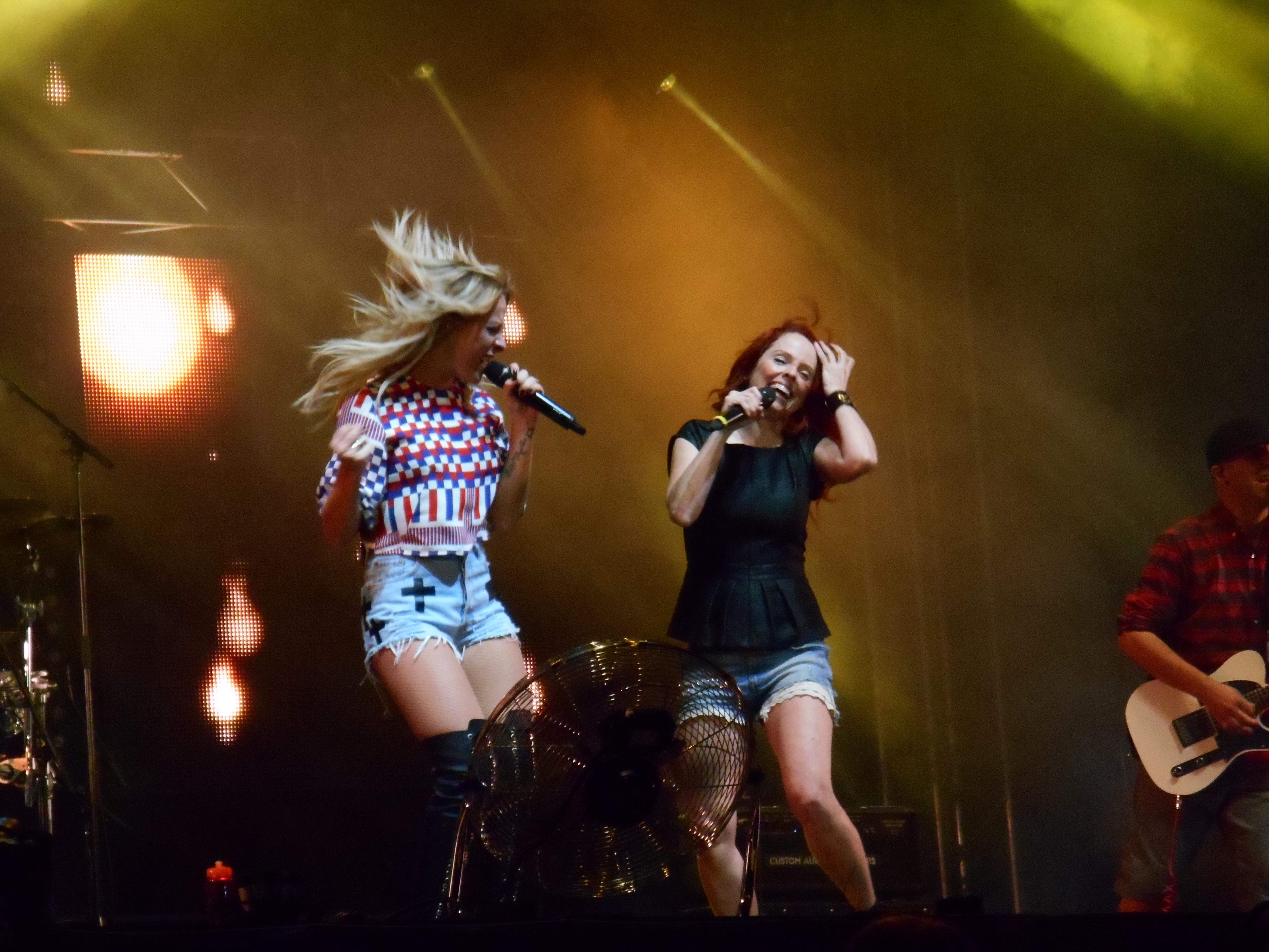 Spectacle de Marie-Mai, dans le cadre des FrancoFolies de Montréal, le 21 juin 2014